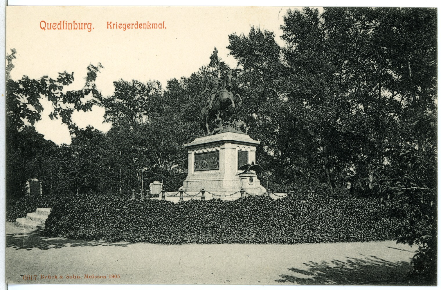 Quedlinburg; Kriegerdenkmal This postcard is from publisher Brück & Sohn in Meißen ( postcard has a unique number 06617 and is available in a higher resolution at the publisher. This images was uploaded in a cooperation project between Wikipedians and the publisher.